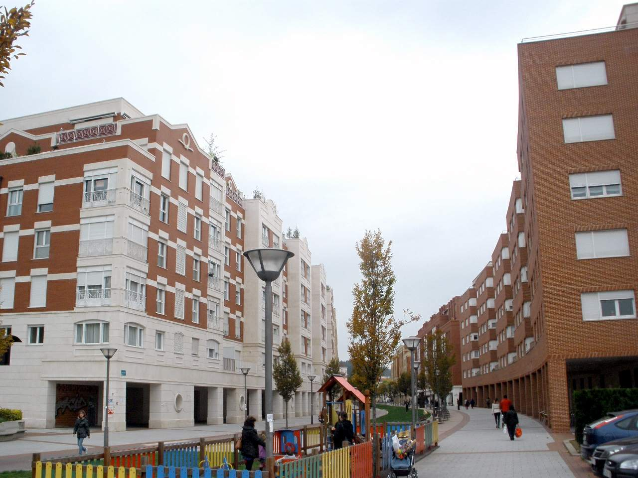 Leioa (Vizcaya)